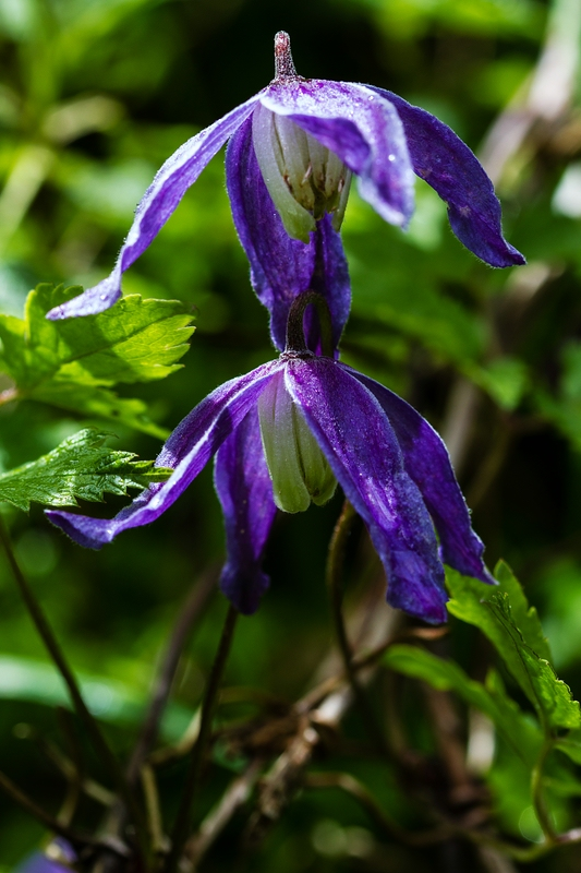 Kärnten im Tauerntal: zwei Blüten der Alpen-Waldrebe